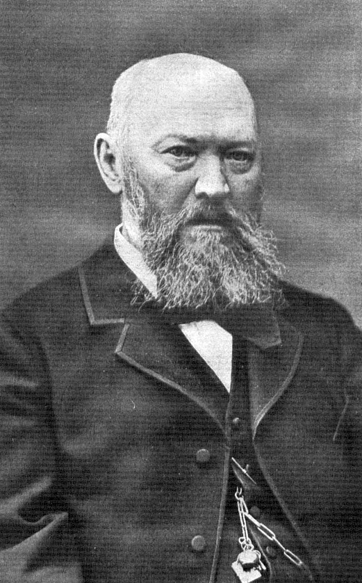 Островский, Александр Николаевич